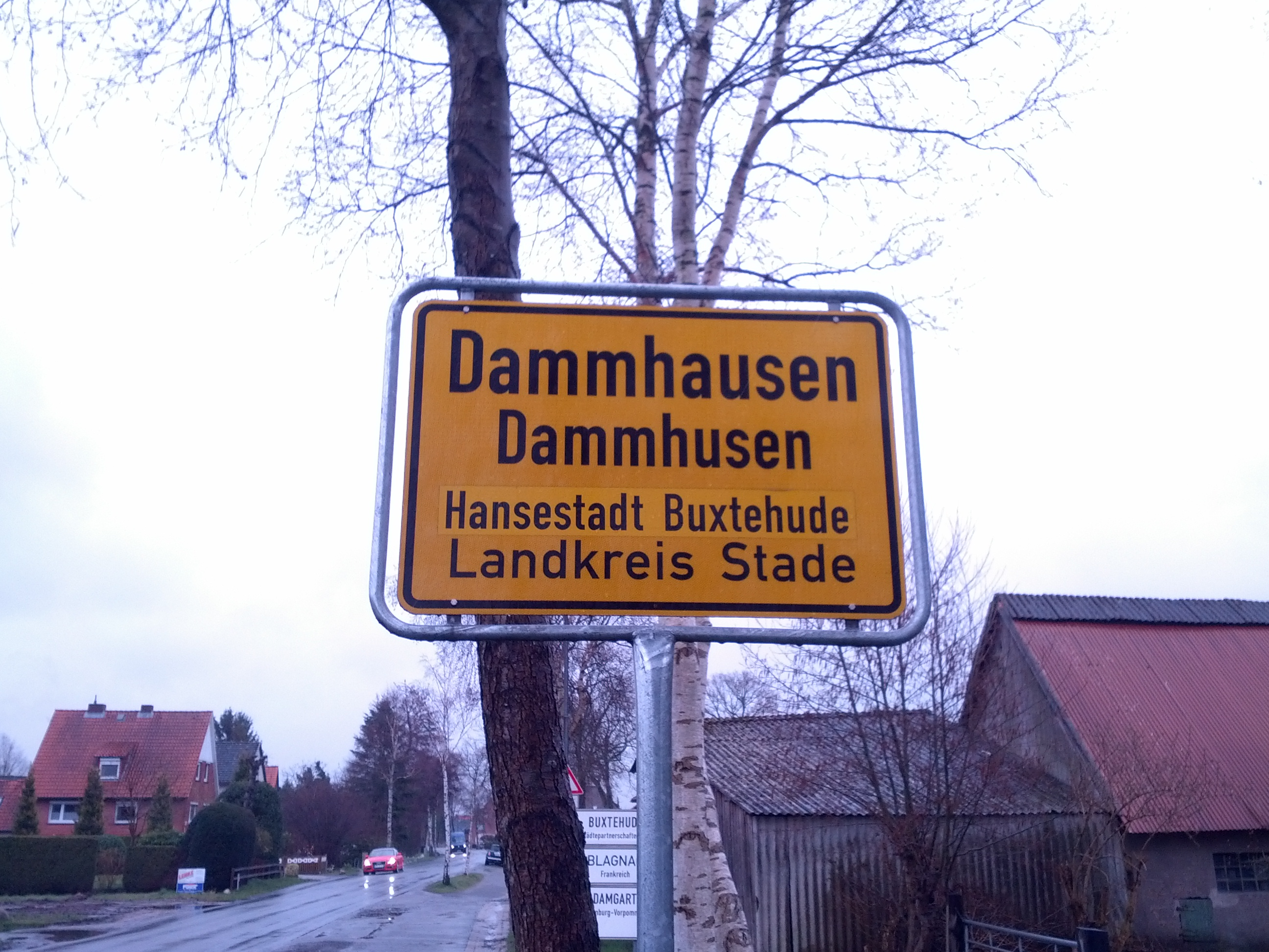 Oortsschild mit den Naam op Hoochdüütsch un op Plattdüütsch